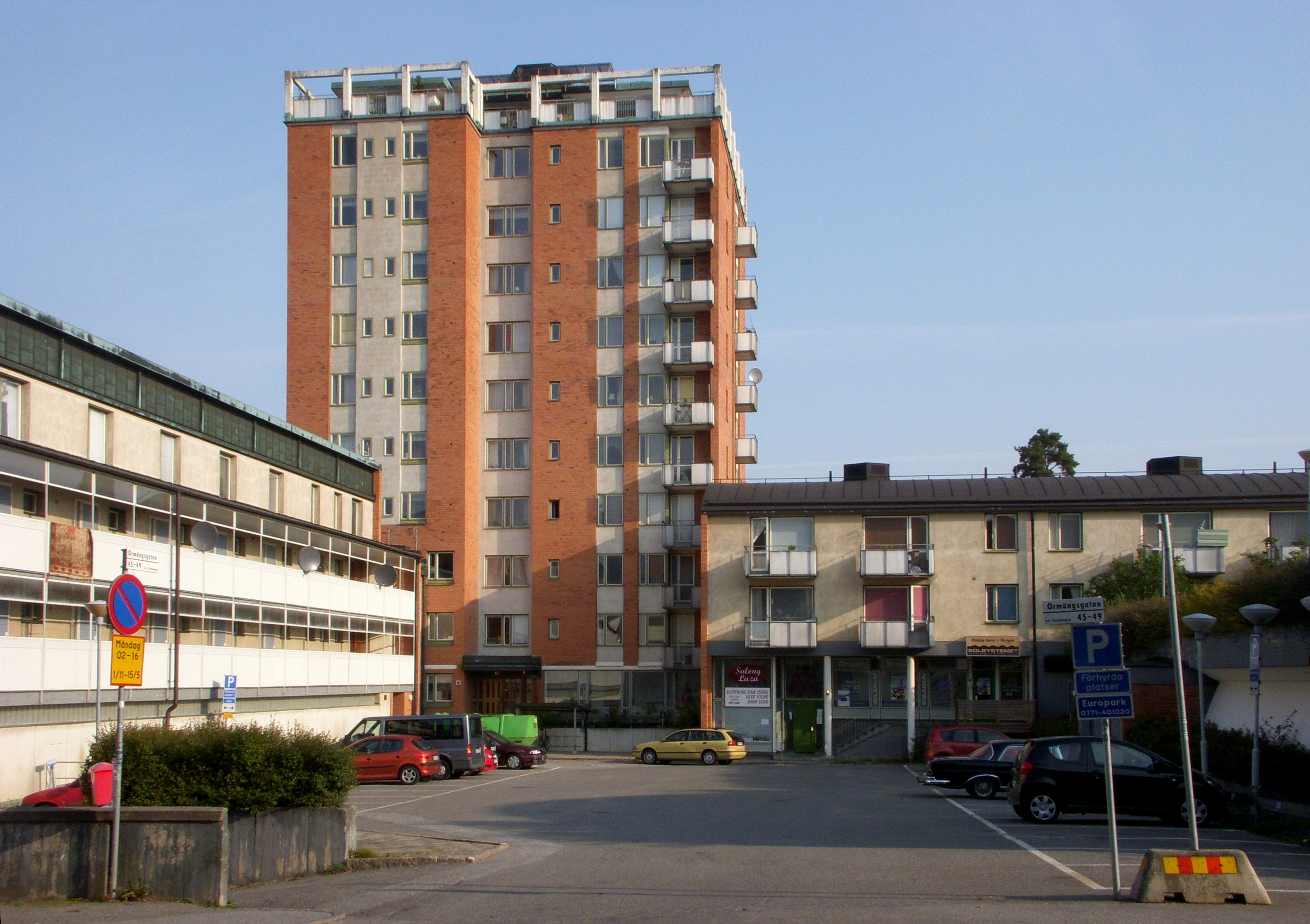 Hässelby Familjehotell, Hässelby strand